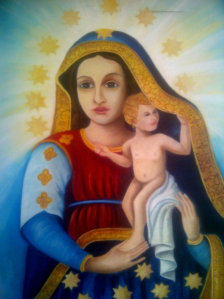 Virgen del Amparo Oleo sobre tela,Pintor Niurka Marcano,detalle.